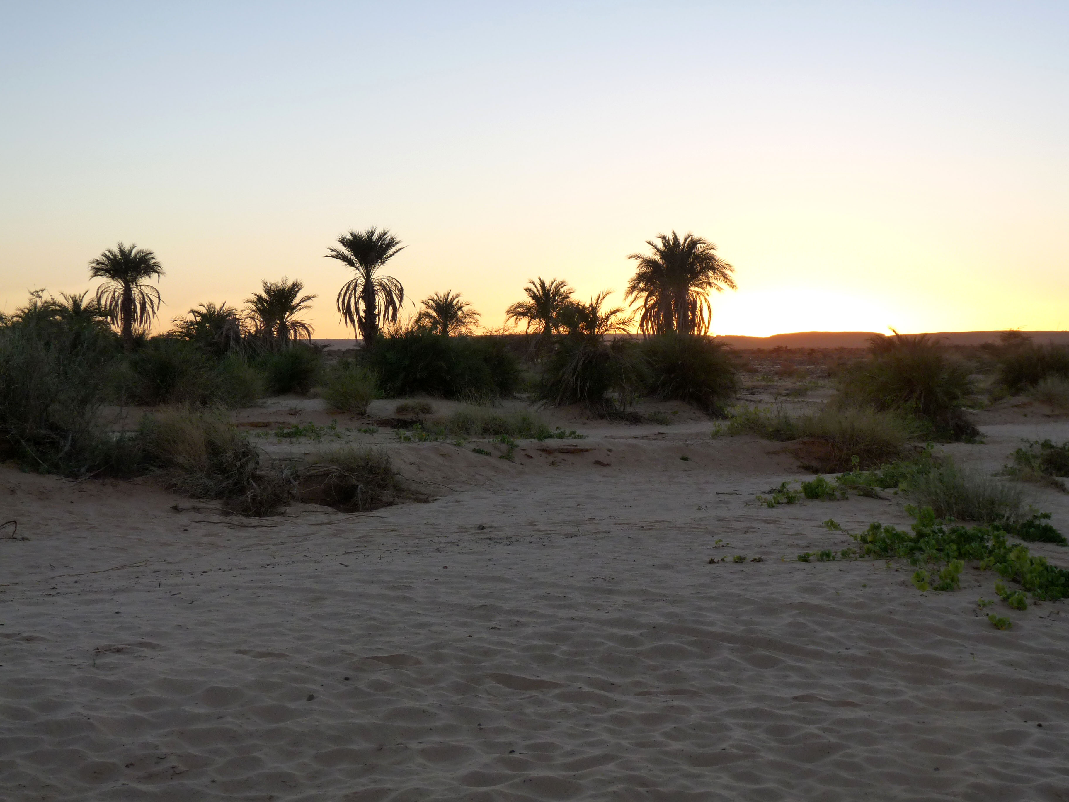 Palmiers en bordure de la batha d'Atar (Mauritanie), au coucher du soleil